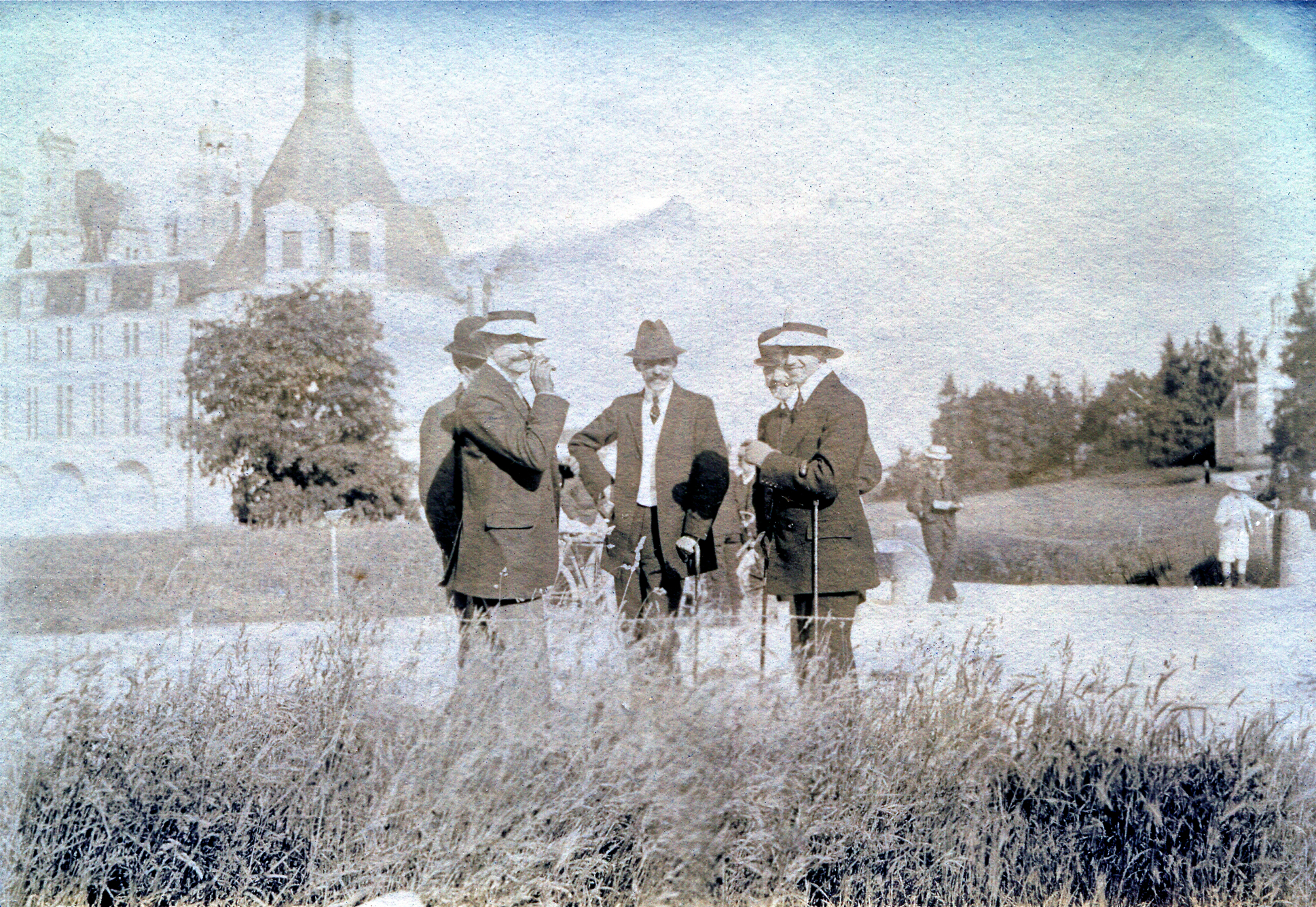 Sixto de Borbón-Parma (a la derecha) y José Joaquín de Olazábal (al centro). Castillo de Chambord